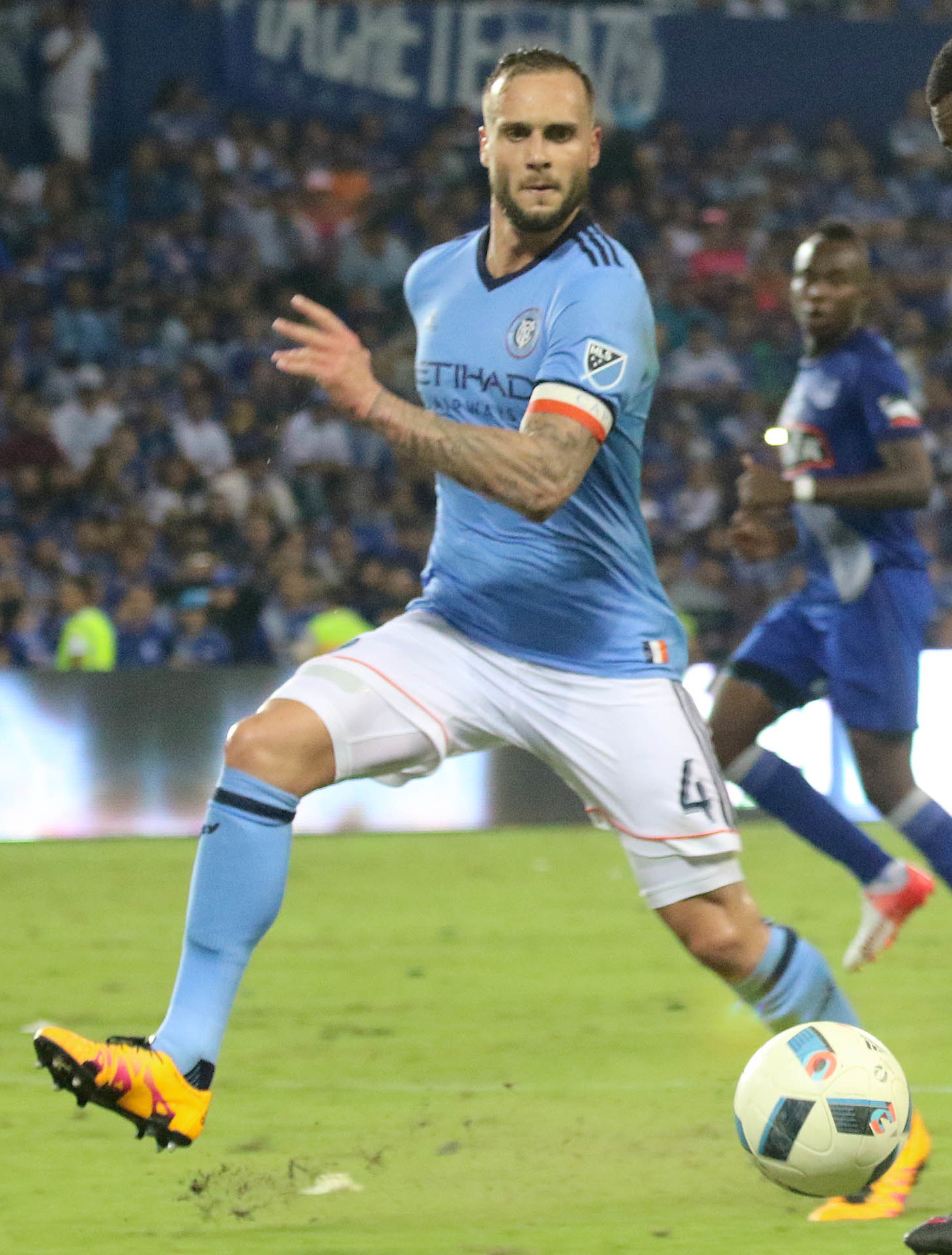 Guayaquil, miércoles 08 de febrero del 2017 (Andes).-Emelec enfrenta al New York City en la reinaguración del estadio Capwell Foto:Andes/César Muñoz